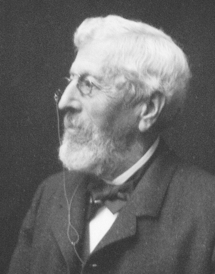 Arkitekt Abraham Ludvig Hedin